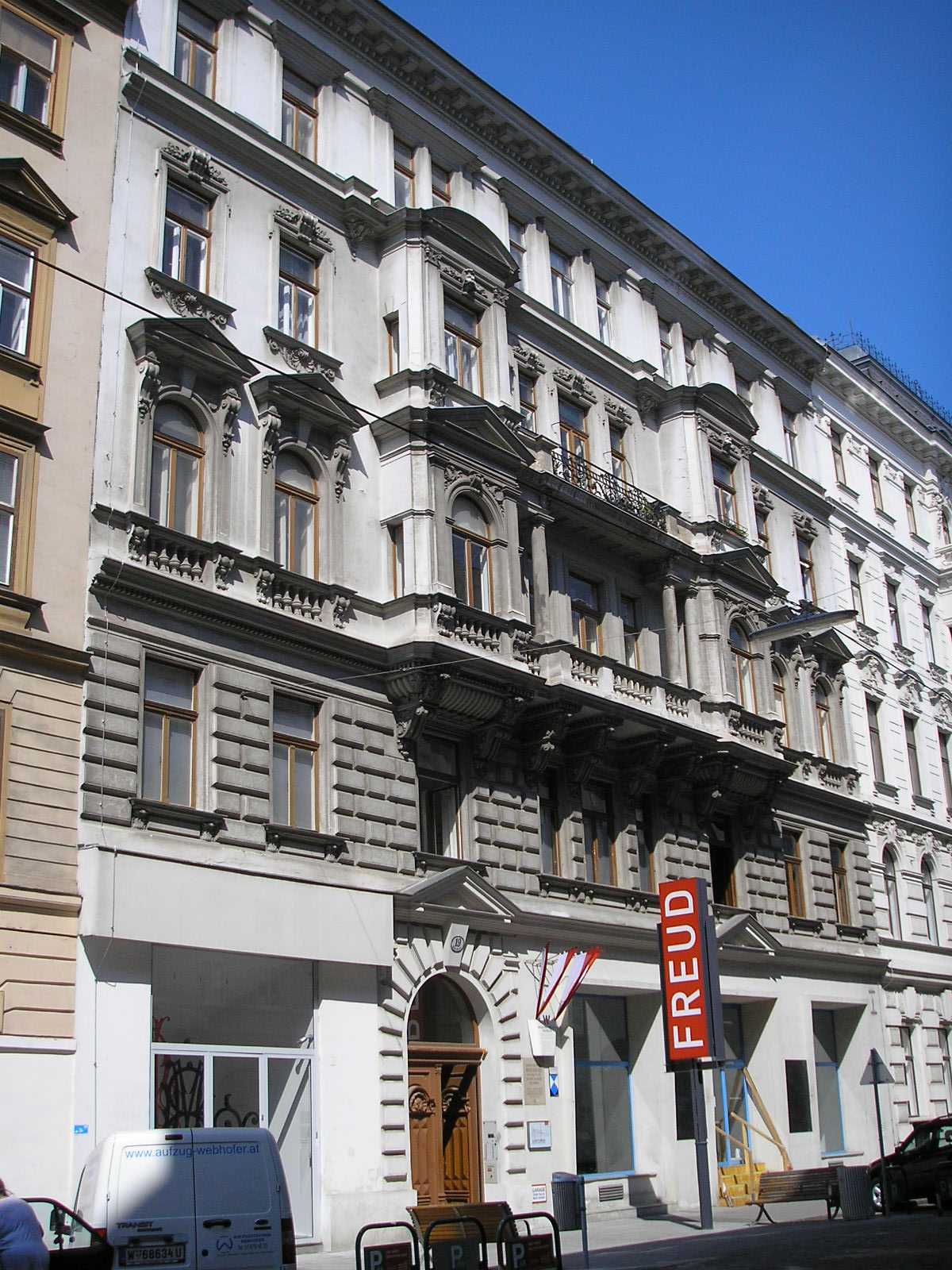 Berggasse 19 in Vienna, Sigmund Freud's house.